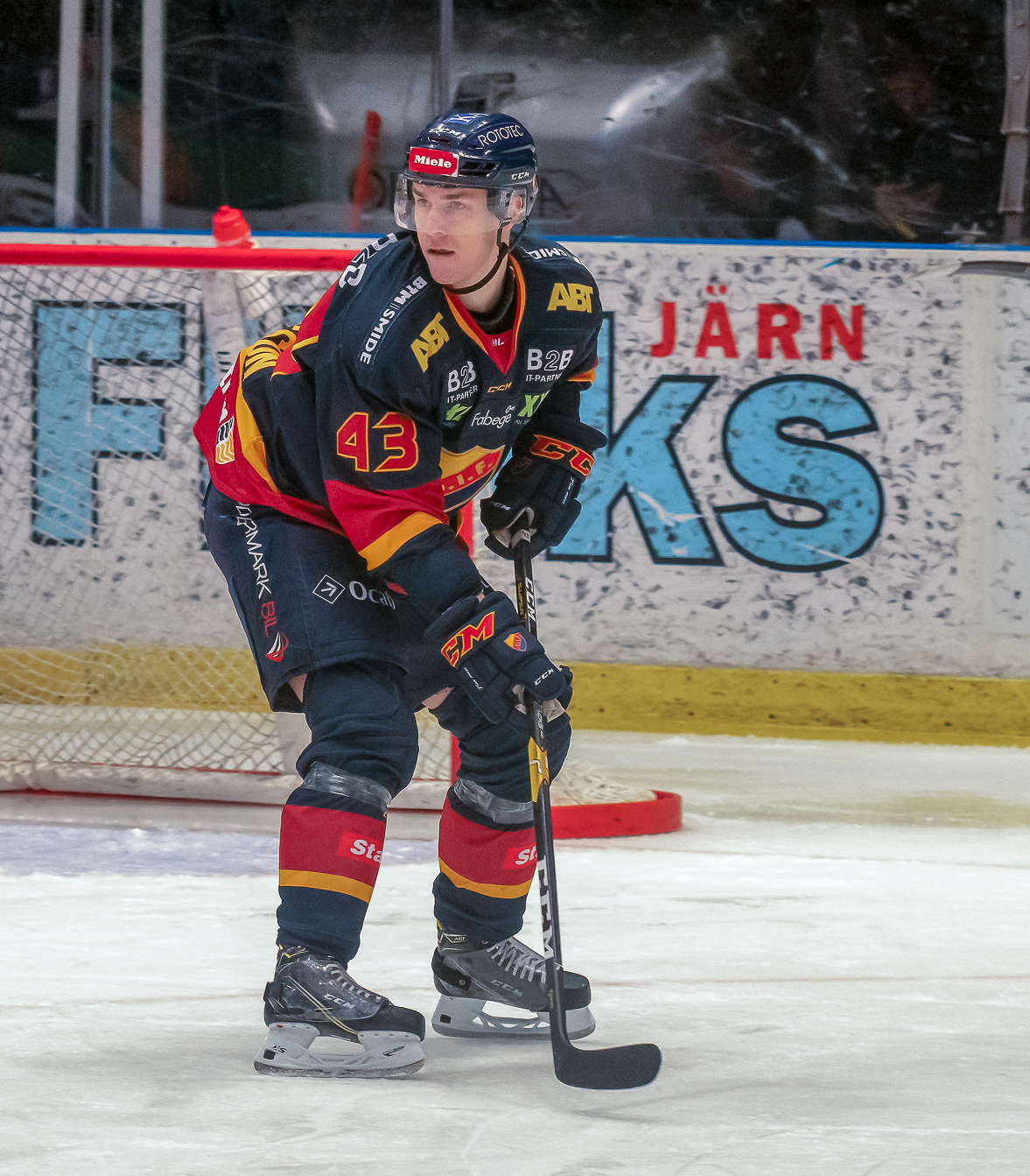 Djurgården-Färjestad 20190129